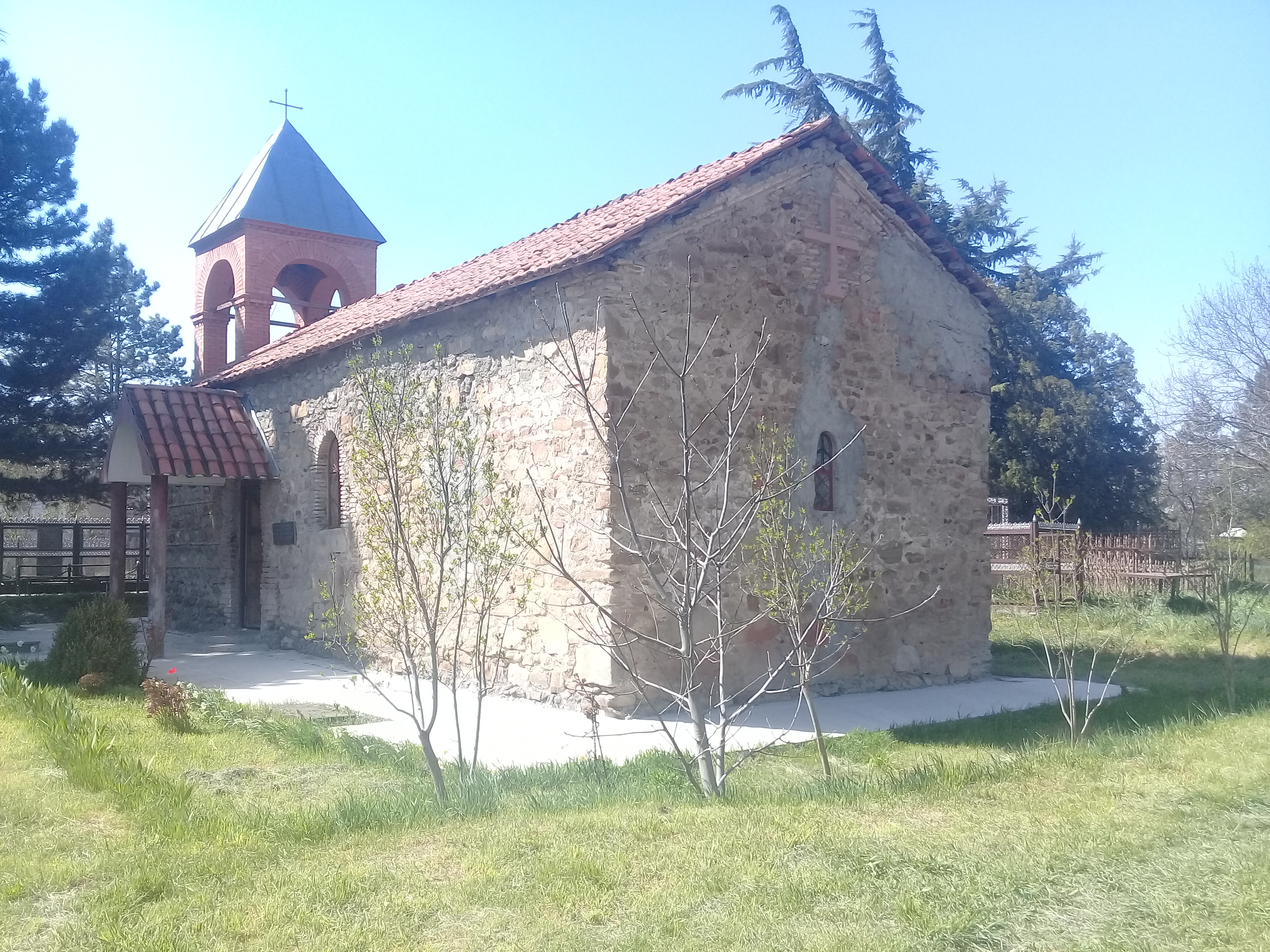 ბერძენაულის ეკლესიის აღმოსავლეთ მხარე